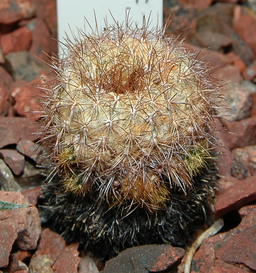 Frailea pumila, Uppsala botanical garden